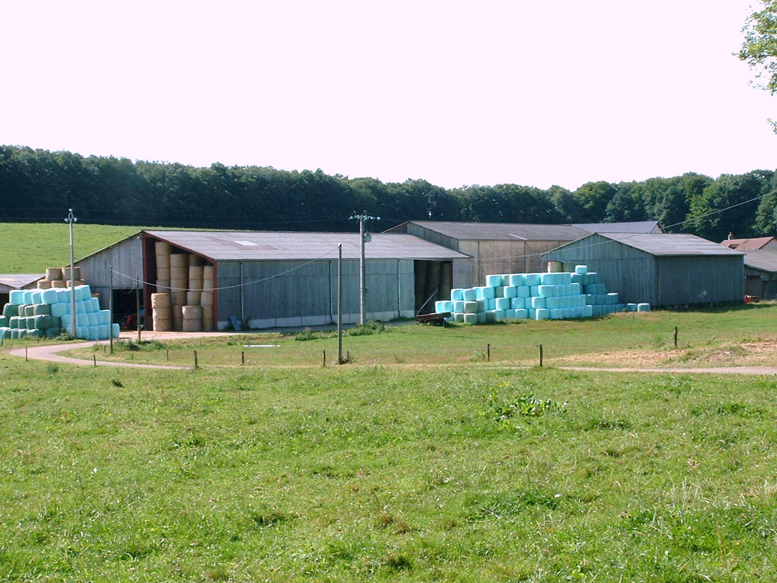 Abbaye Sainte-Marie de la Pierre-qui-Vire, Yonne : la ferme